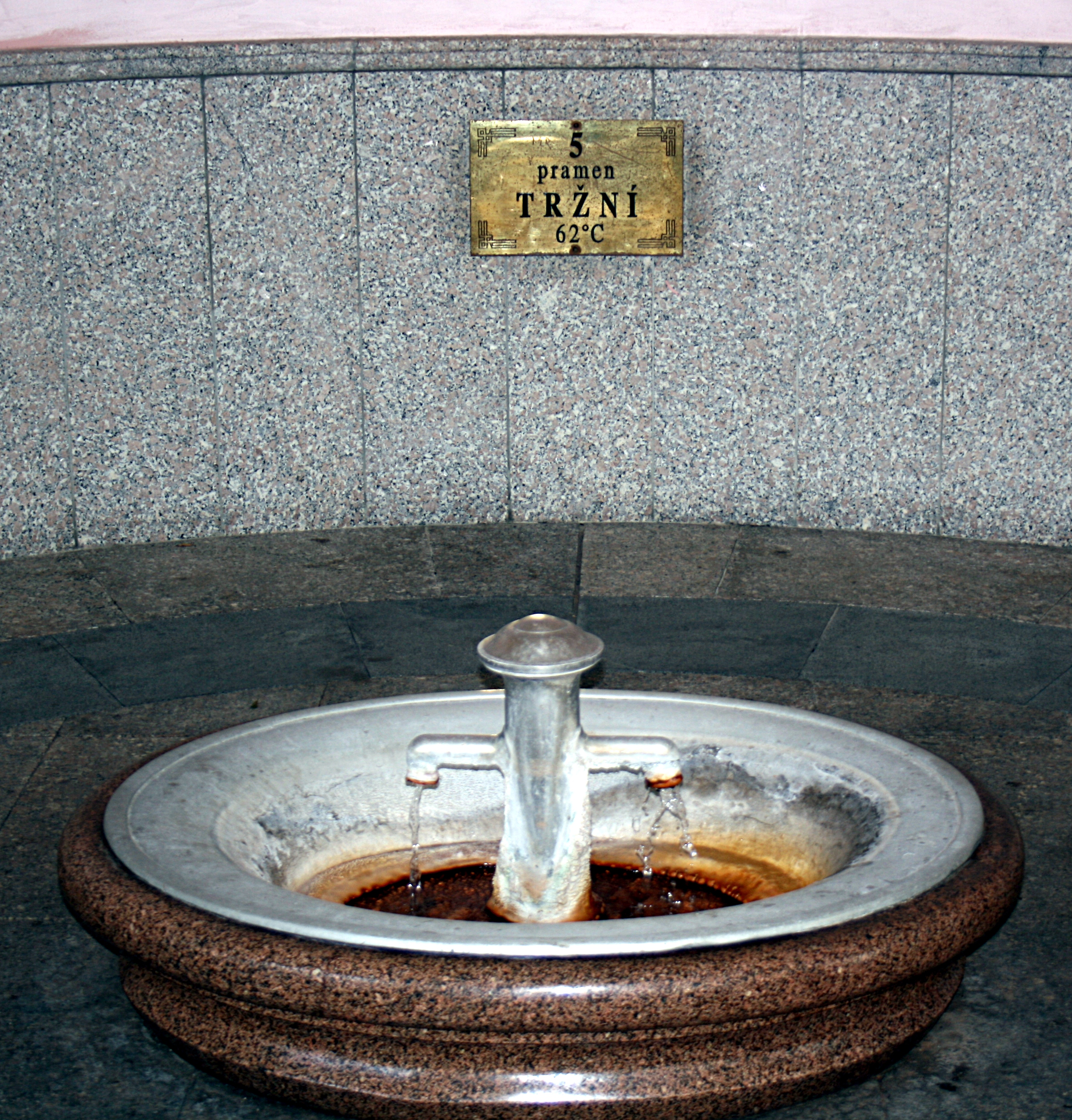 Karlovy Vary, Pramen "Tržní", 62°C